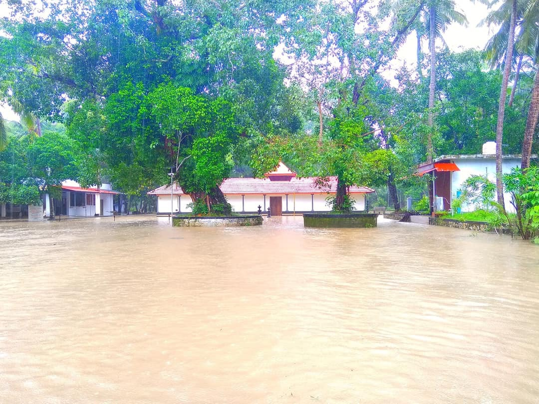 ശ്രീ ഭയങ്കാവ് ഭഗവതി ക്ഷേത്രം